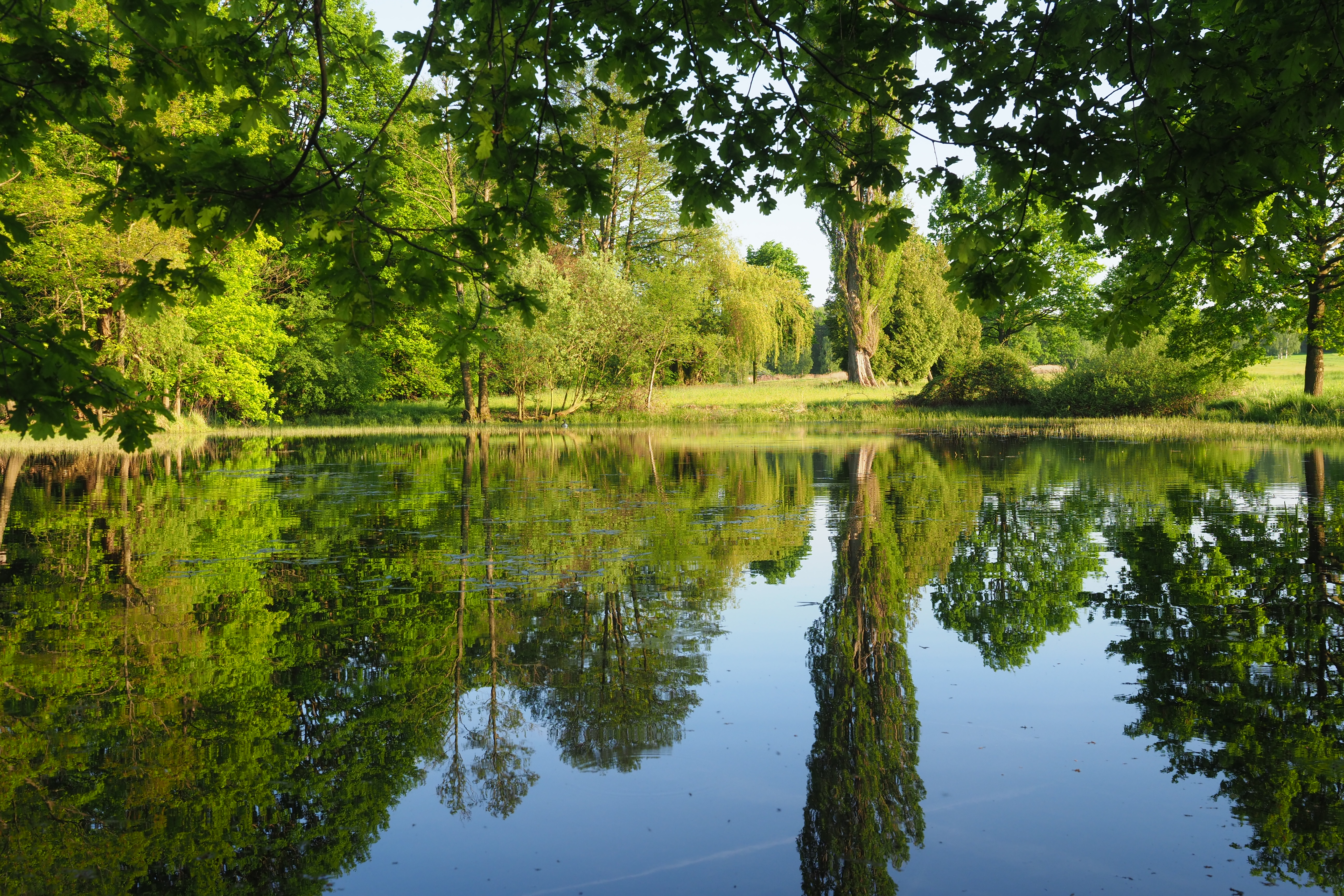 Naturschutzgebiet Linzer Wasser